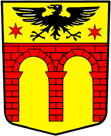 Wappen von Inden Kanton Wallis Schweiz